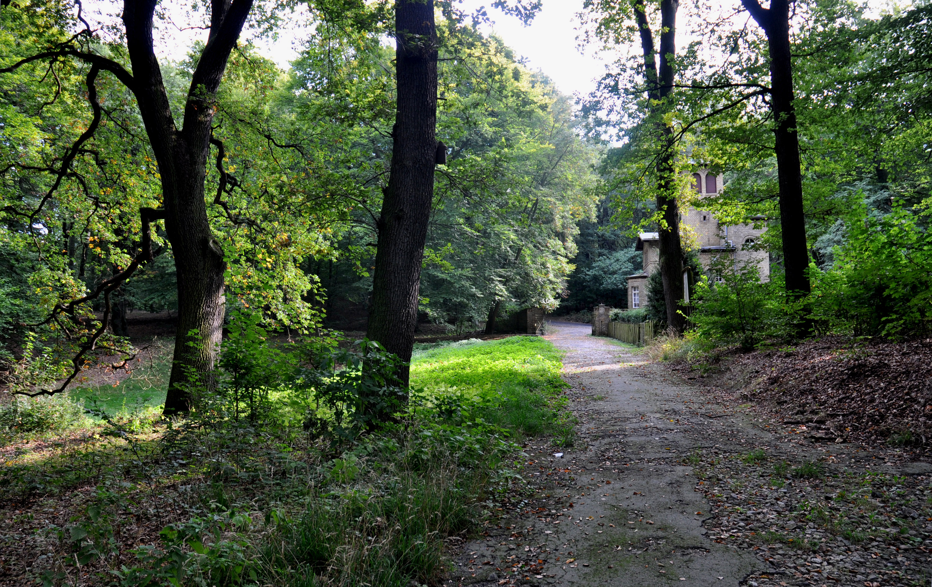 Kleiner Parkreum am Wildparktor in Klein-Glienicke